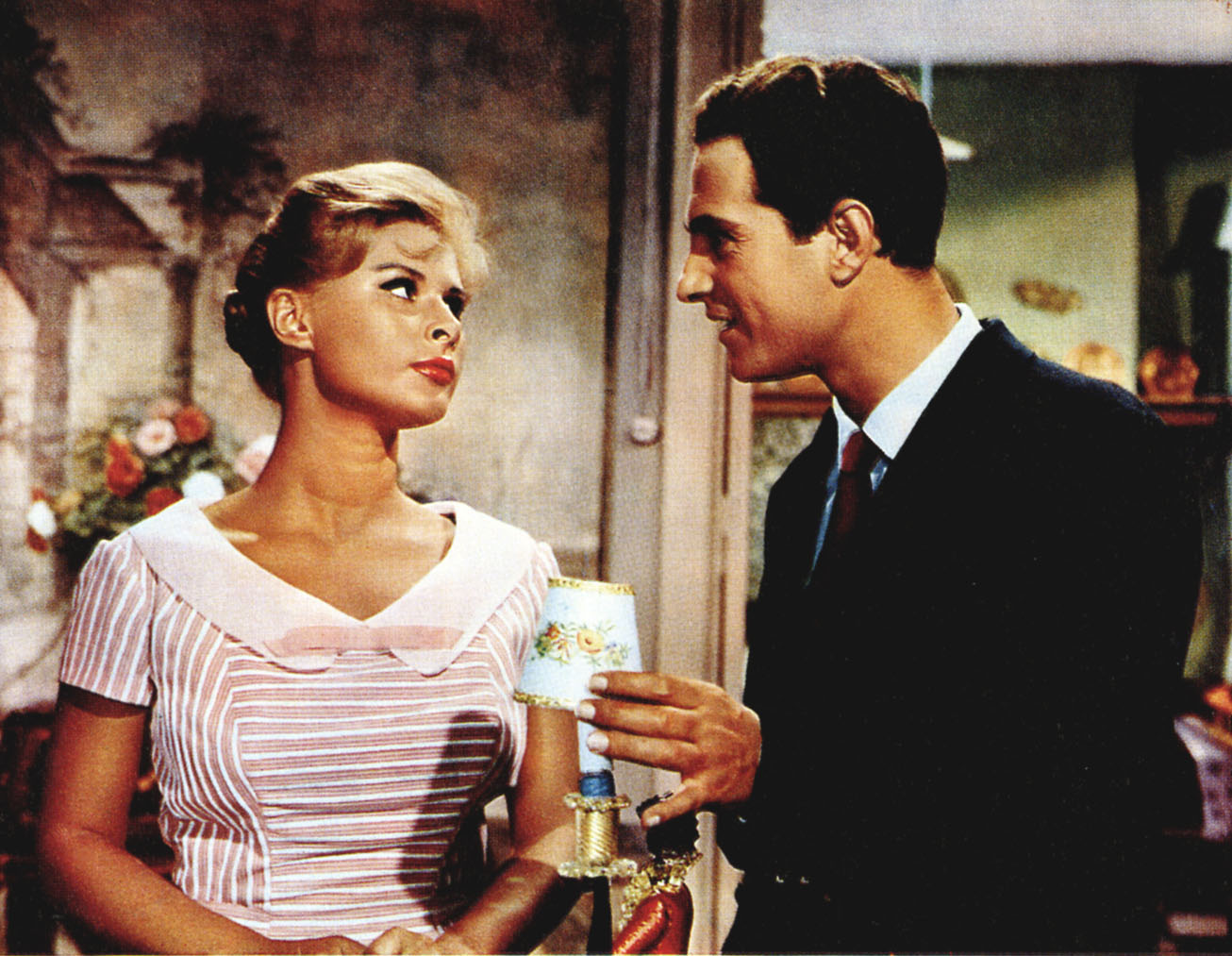 foto di scena del film Venezia, la luna e tu